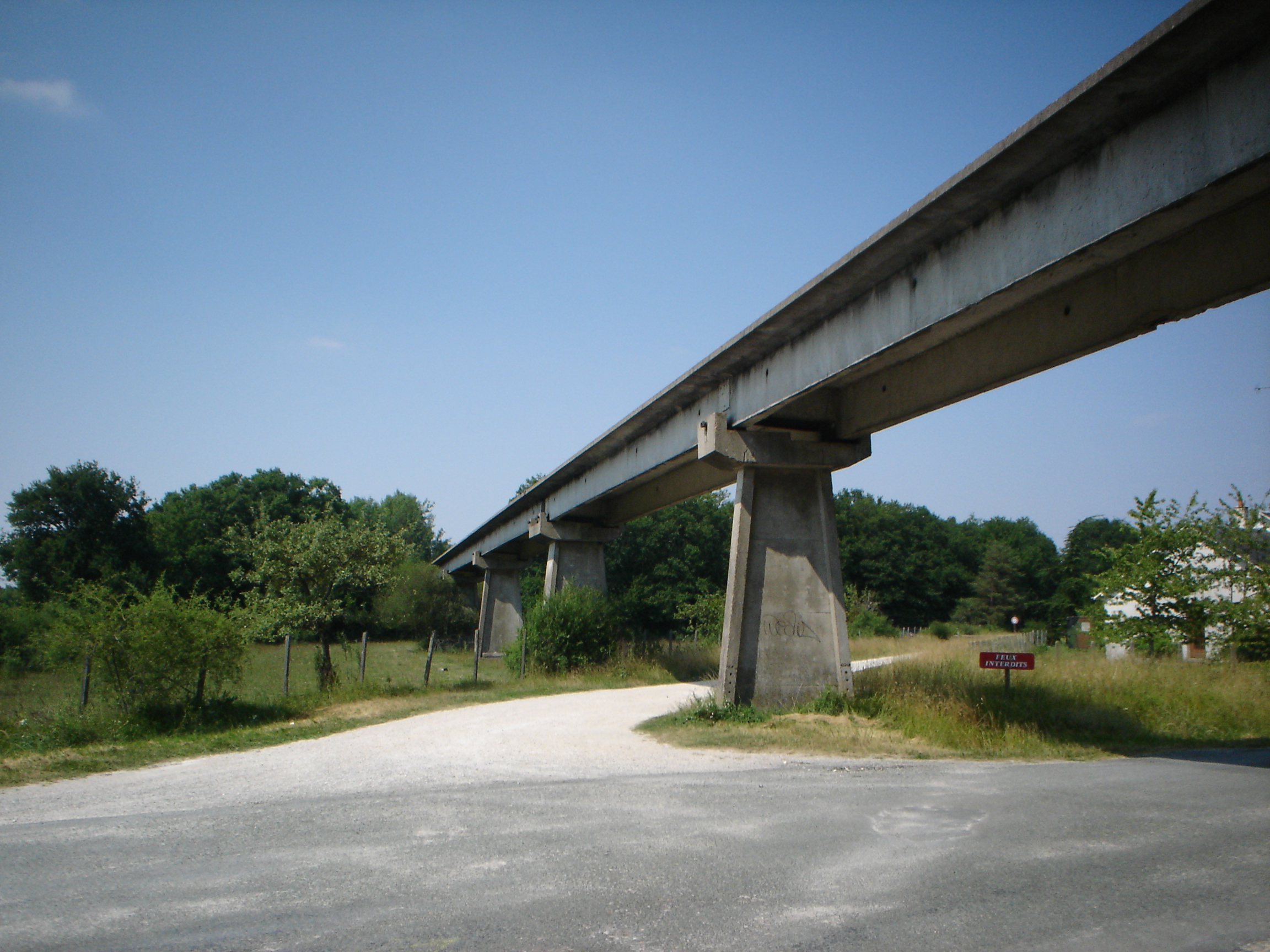 Photo de rail de l'aérotrain à Saran, Loiret, Centre, France